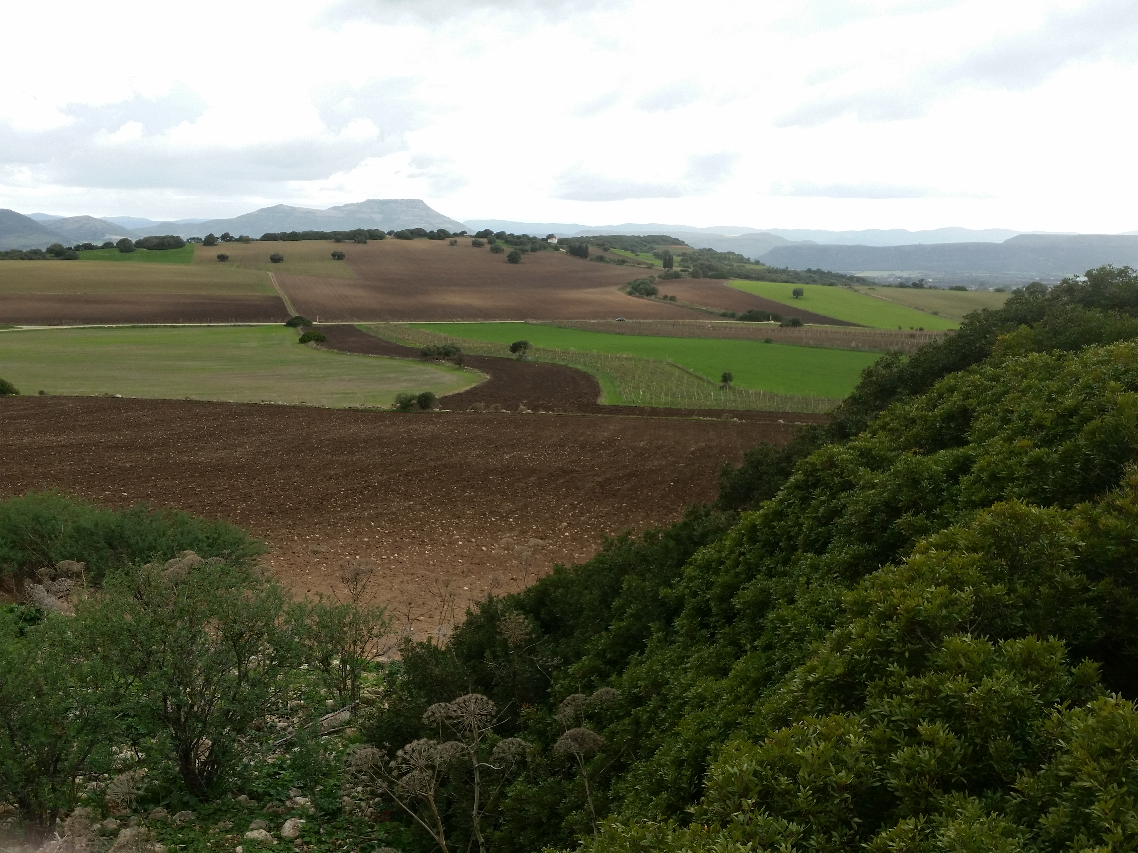 Campagna santadese nell'autunno 2018, zona Funtana Luma